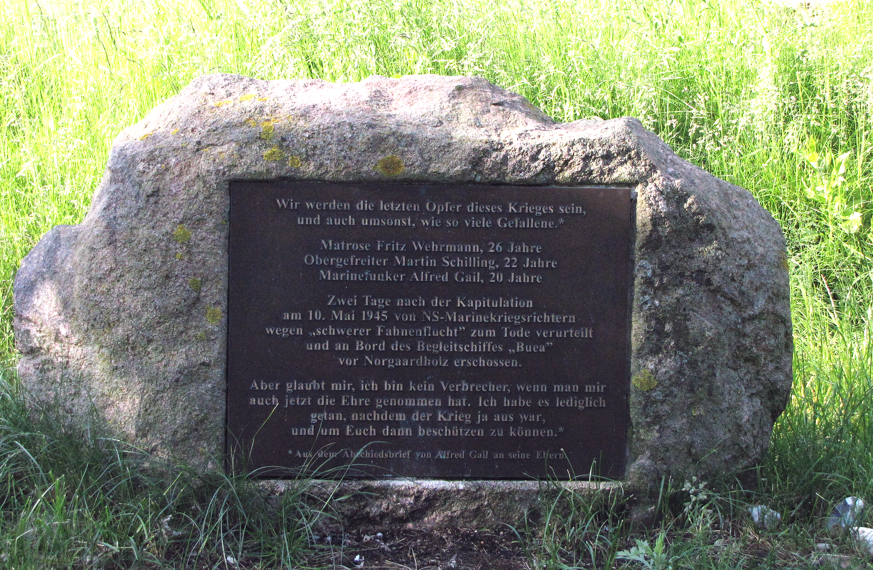 Steinberg Ostsee Gedenkstein in Norgaardholz für nach Kapitulation des 2. Wlrkrieges hingerichteten Soldaten Fritz Wehrmann, Martin Schilling und Alfred Gail Foto 2012 Wolfgang Pehlemann IMG_7257